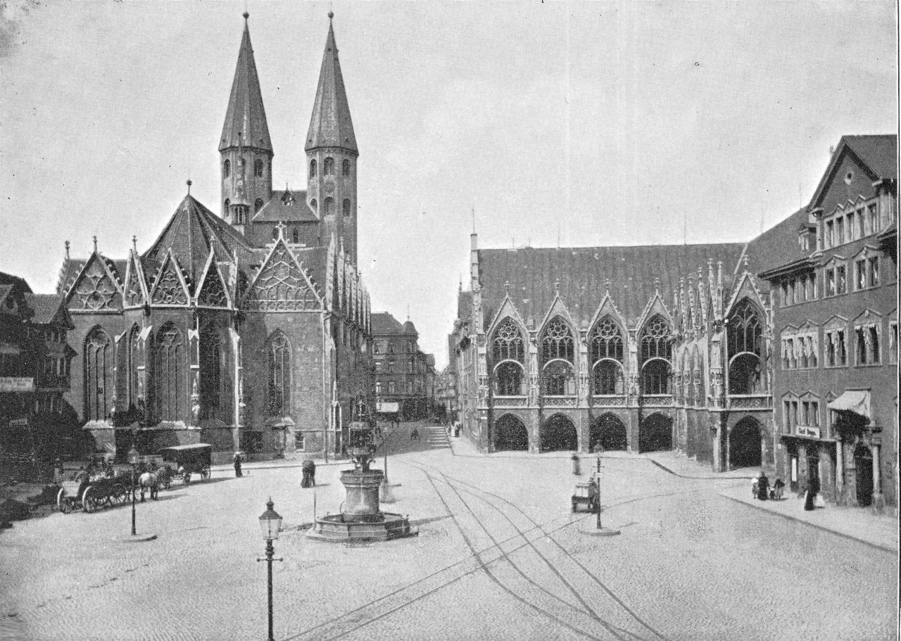 Braunschweig: Altstadtmarkt mit Altstadtrathaus, Marienbrunnen, Martini-Kirche und Stechinelli-Haus um 1897. Braunschweig, Germany: Old Town market square with Old Town town hall, St. Mary’s Fountain, St. Mary’s Church and Stechinelli House, approx. around 1897.